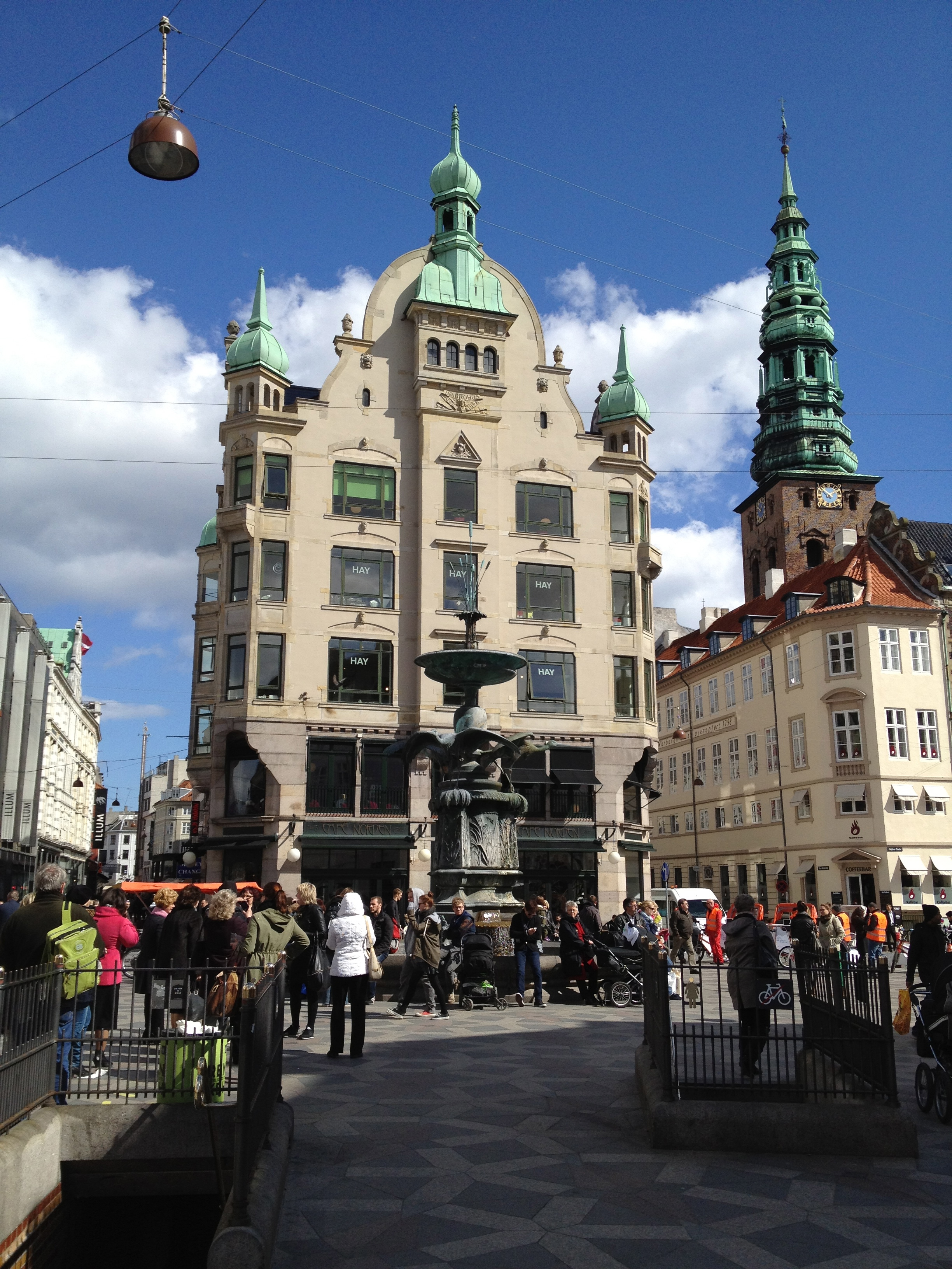 Højbrohus at Amagertorv in Copenhagen, Denmark